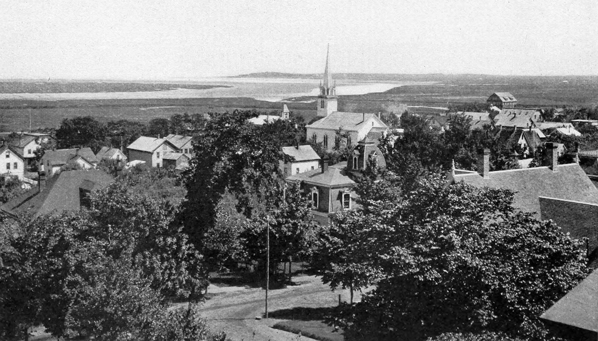 Wolfville, Nova Scotia